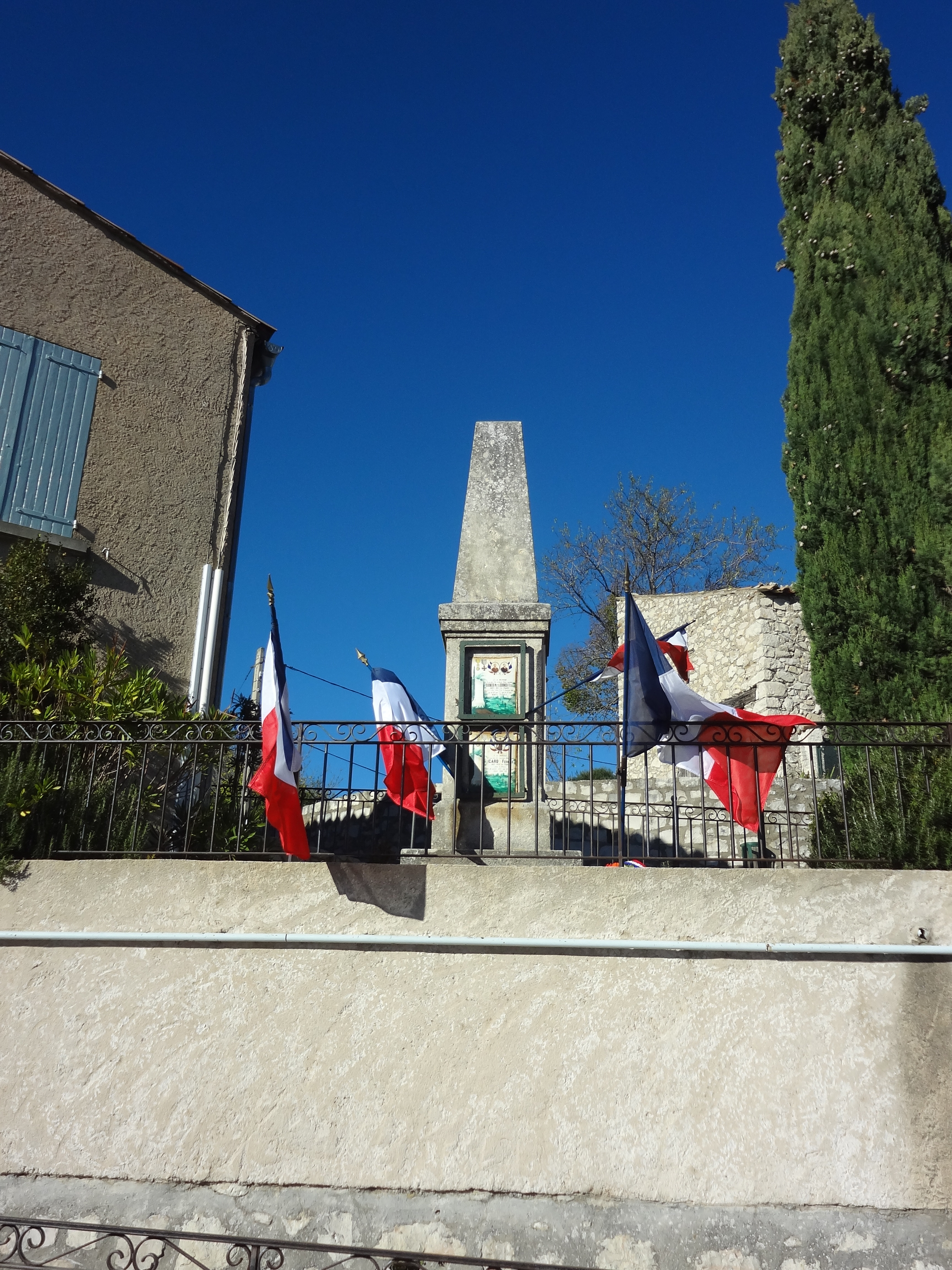 monument aux morts de Montfort (Alpes-de-Haute-Provence)